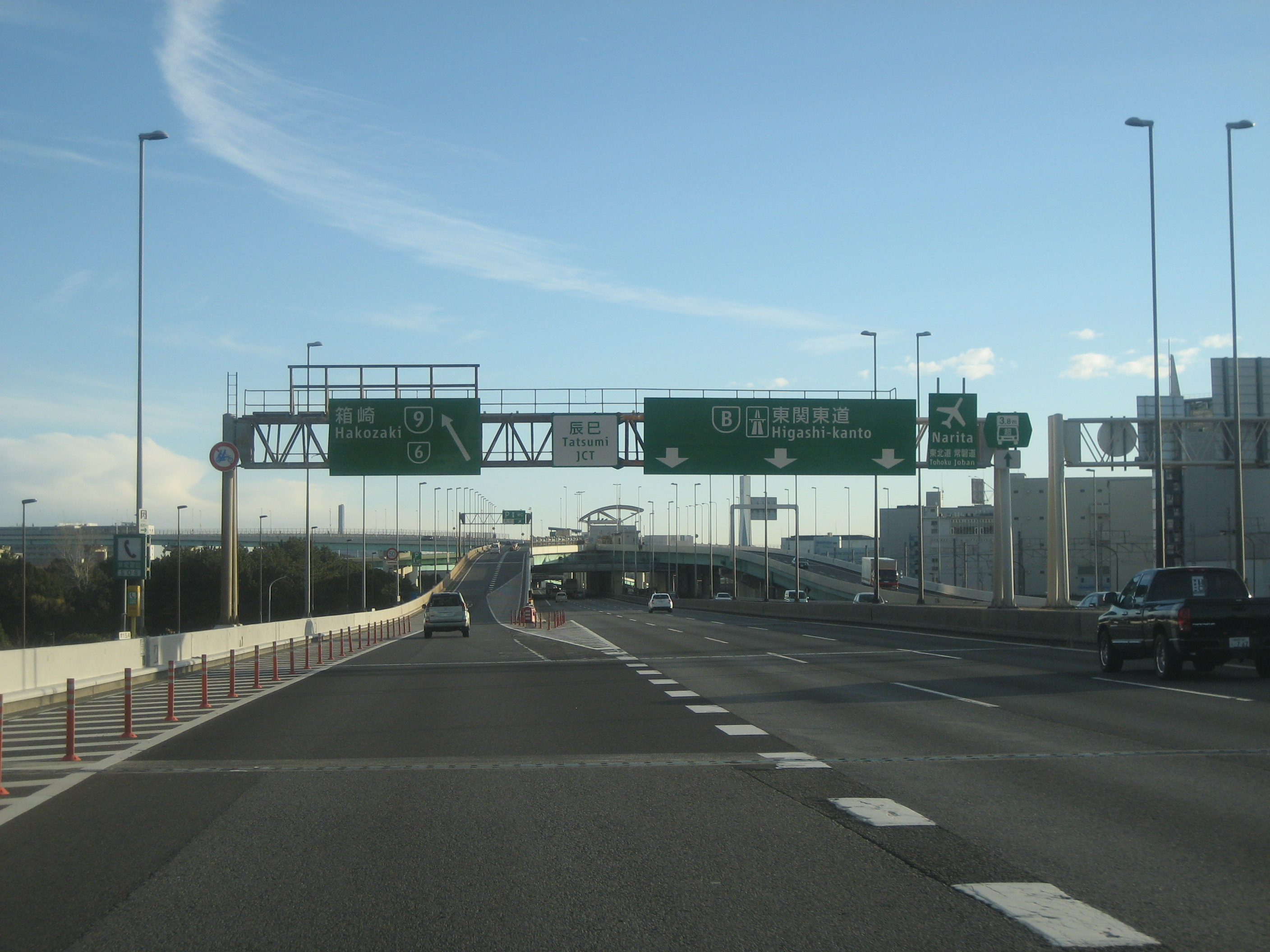 首都高速辰巳JCT（湾岸線東行き方面を撮影）